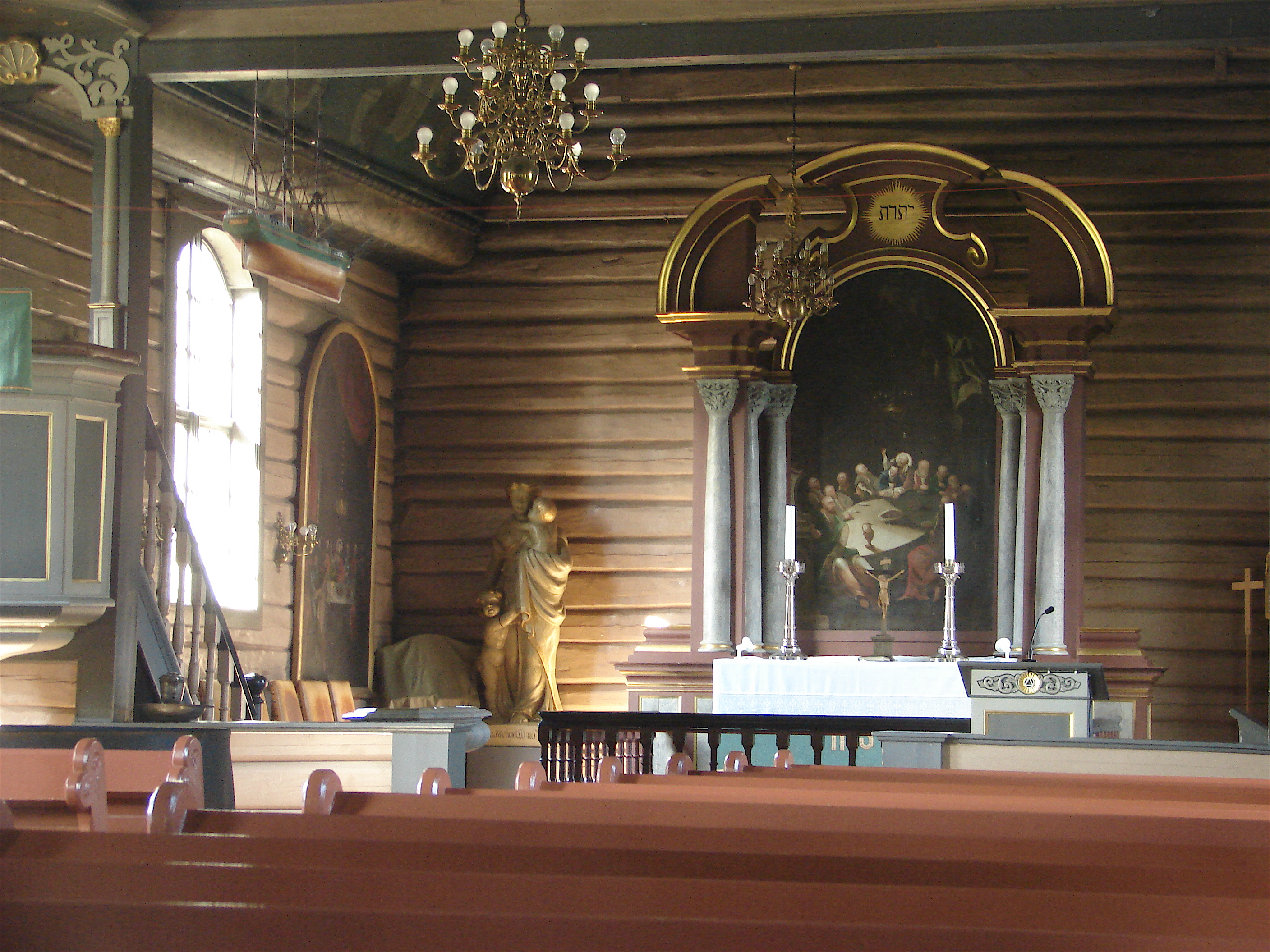 Inventar fra Vestre Porsgrunn Kirke, Porsgunn i Grenland, Telemarken